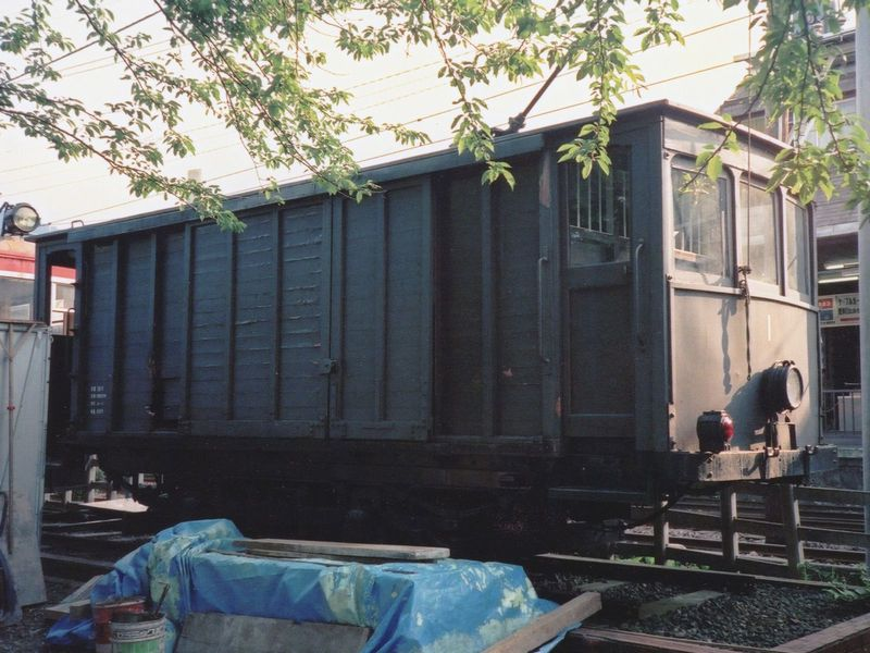 箱根登山鉄道 ユ1形電動貨車（ユは有蓋車の意味） 強羅駅にて（現在は撤去されている）